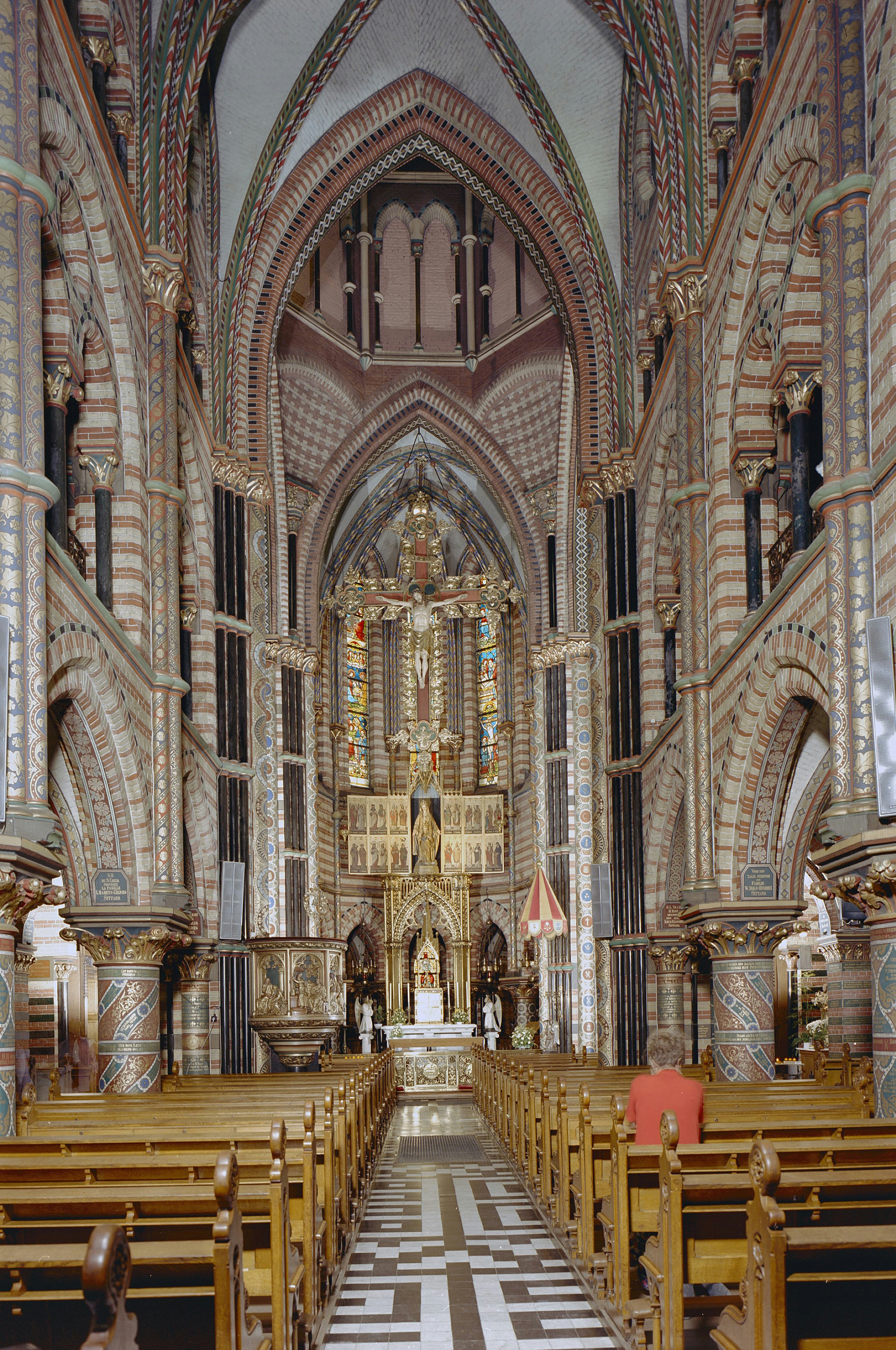 Onze Lieve Vrouwe Van Het Heilige Hart: Interieur, middenbeuk richting koor